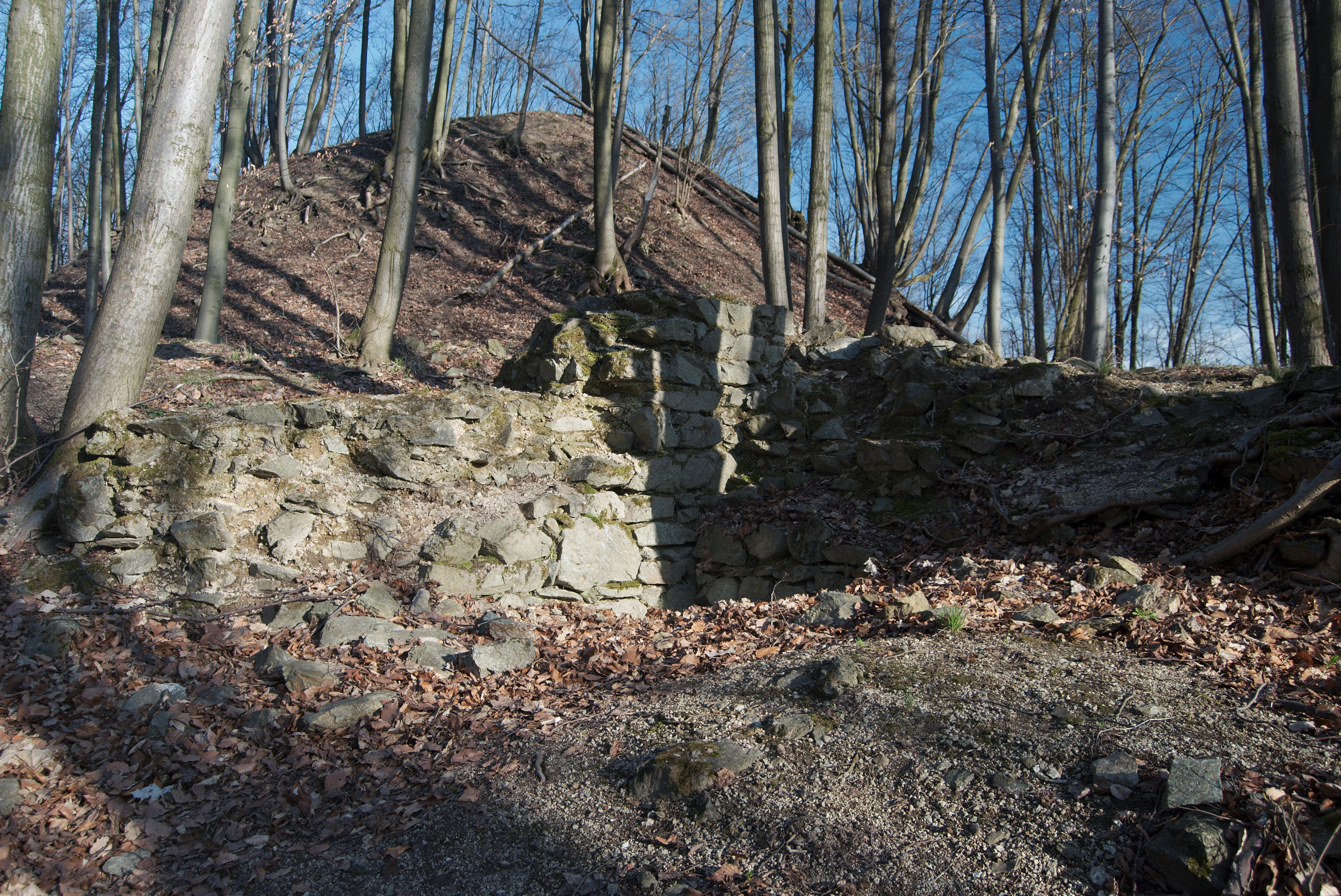 Česky: Starý hrad u Adamova - zbytek zdiva